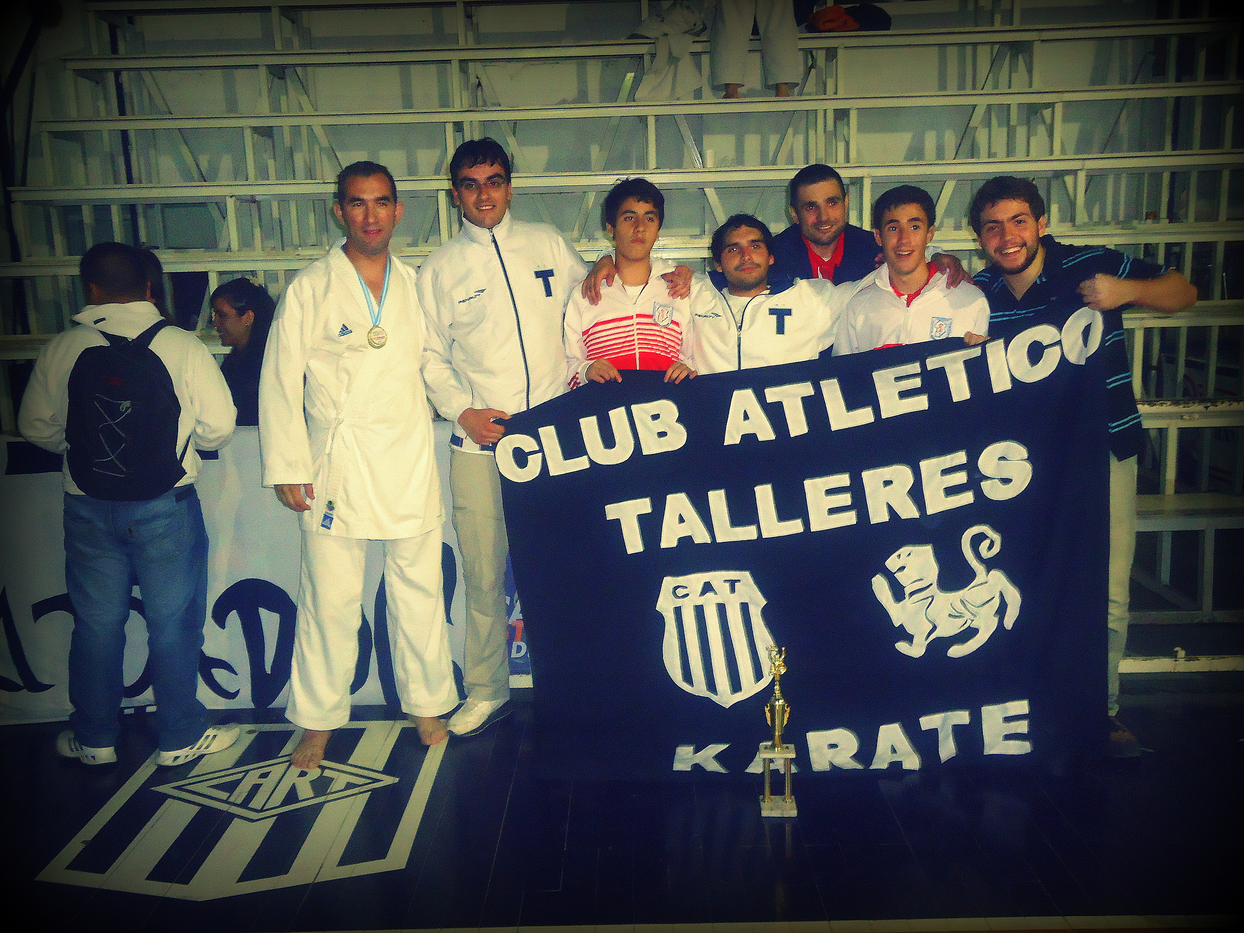 Equipo del Club Atlético Talleres